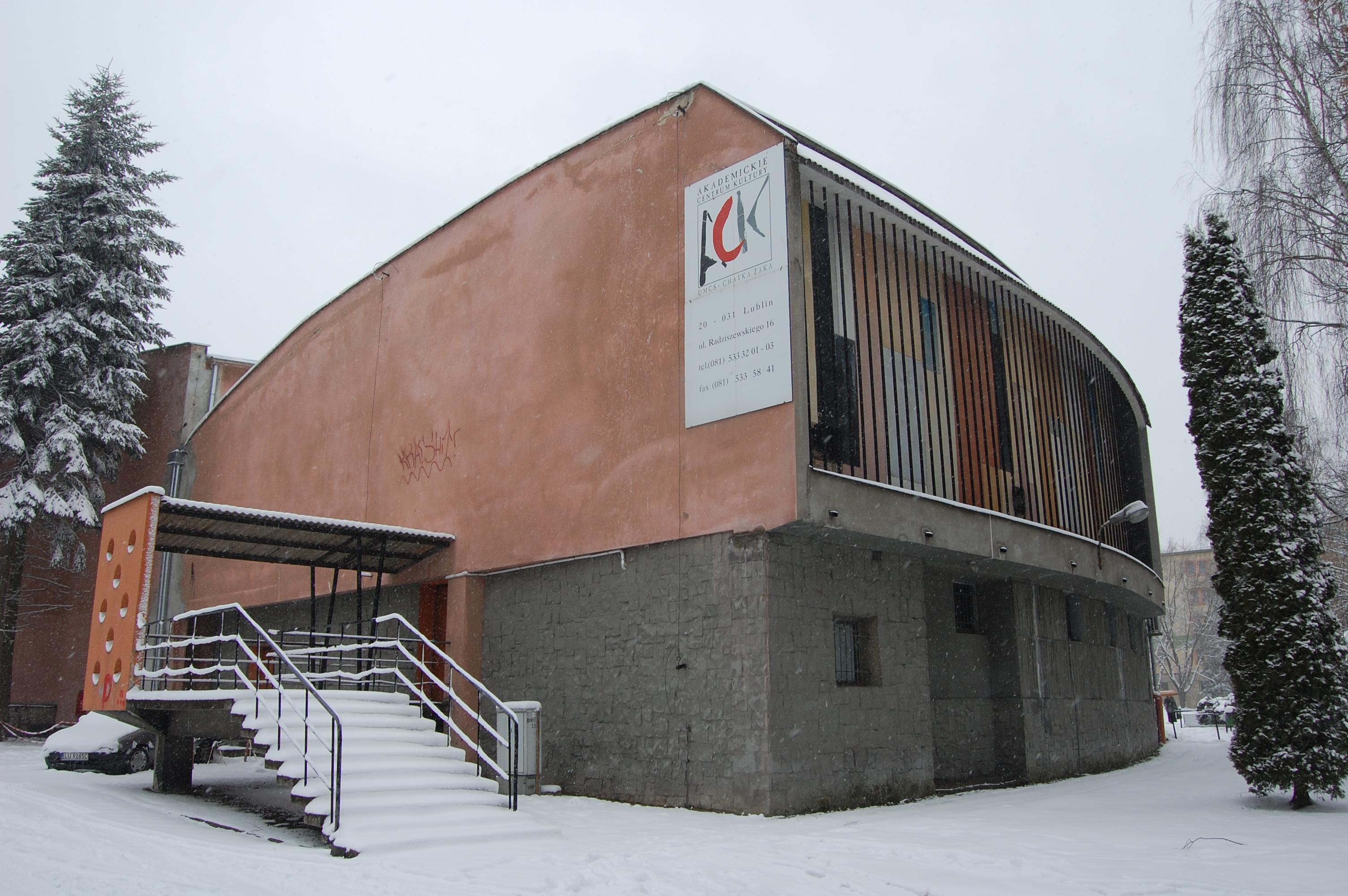 Akademickie Centrum Kultury w Lublinie, Chatka Żaka